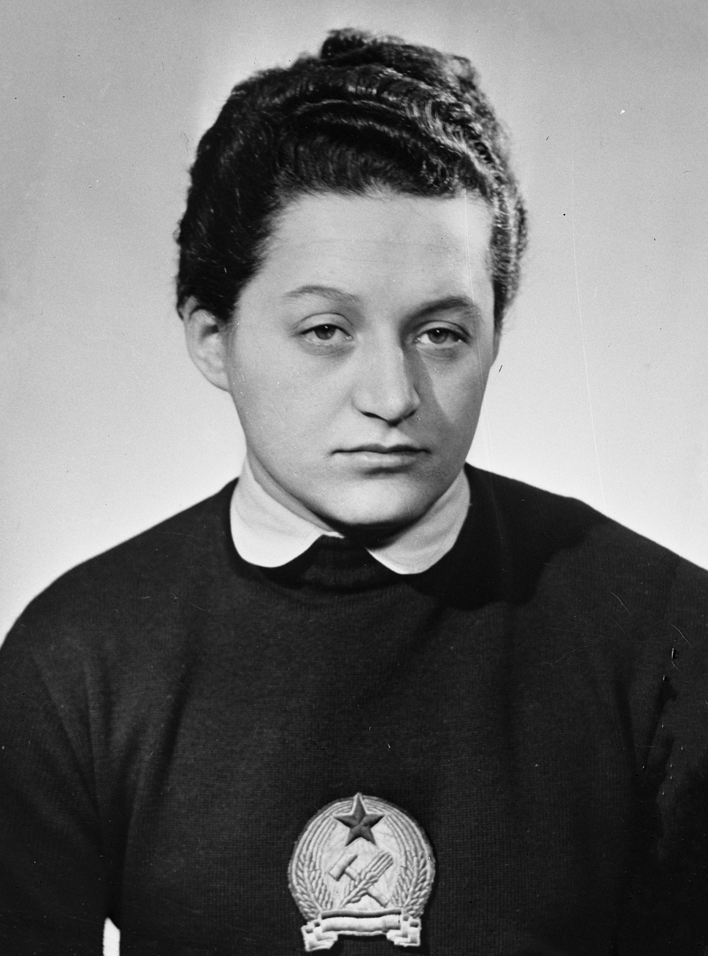 Valeria Gyenge , Hongaarse zwemster van Olympische Spelen